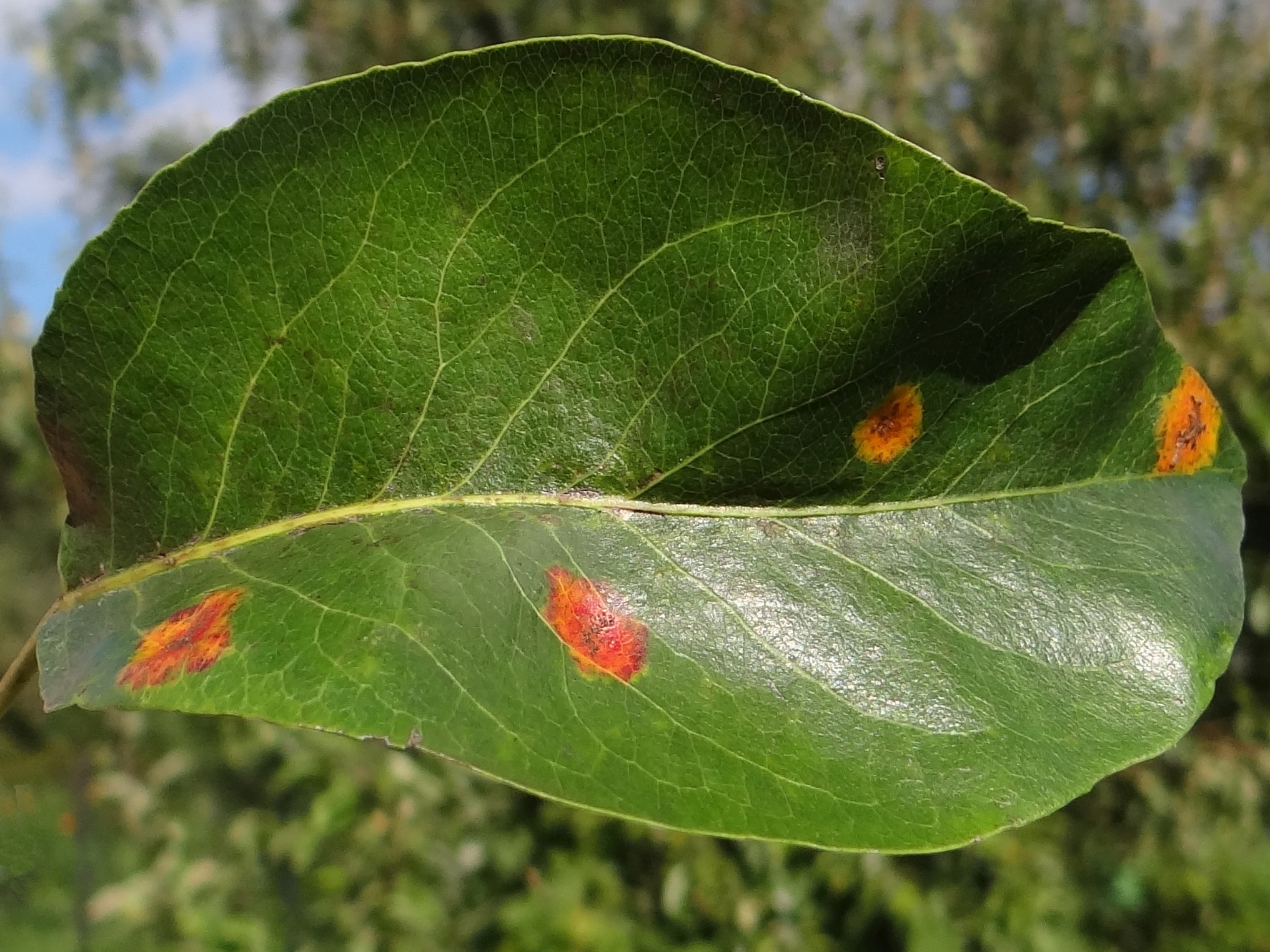 Gymnosporangium sabinae on Pyrus